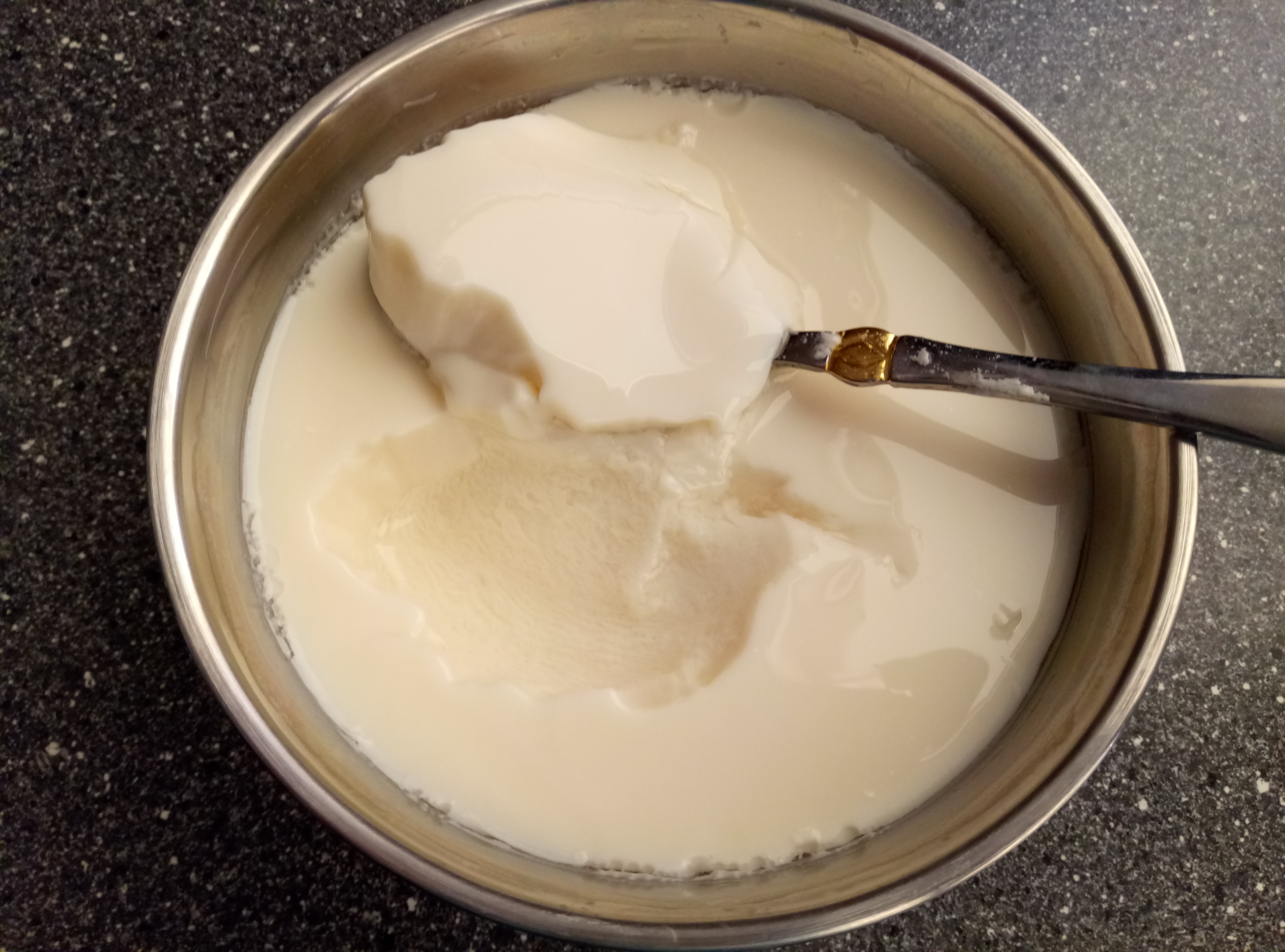 Сойгурт приготовленный в домашней йогуртнице